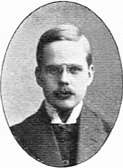 Arkitekten Carl-Otto Hallström